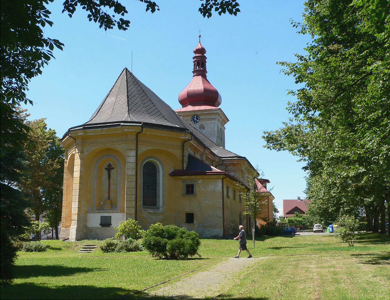 Kostel sv. Vavřince (Seč), nám., Seč, Seč (okres Chrudim).